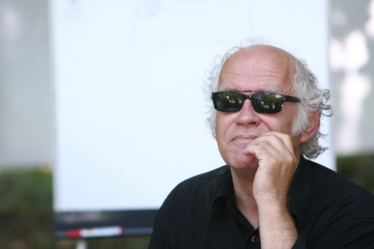 Йос Стеллинг - глава жюри 1-го Одесского международного кинофестиваля-2010